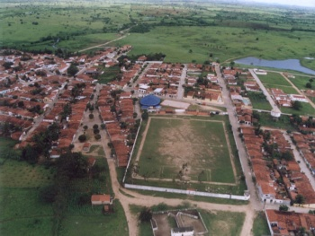 Foto do Estádio Municipal João Aureliano de Lima